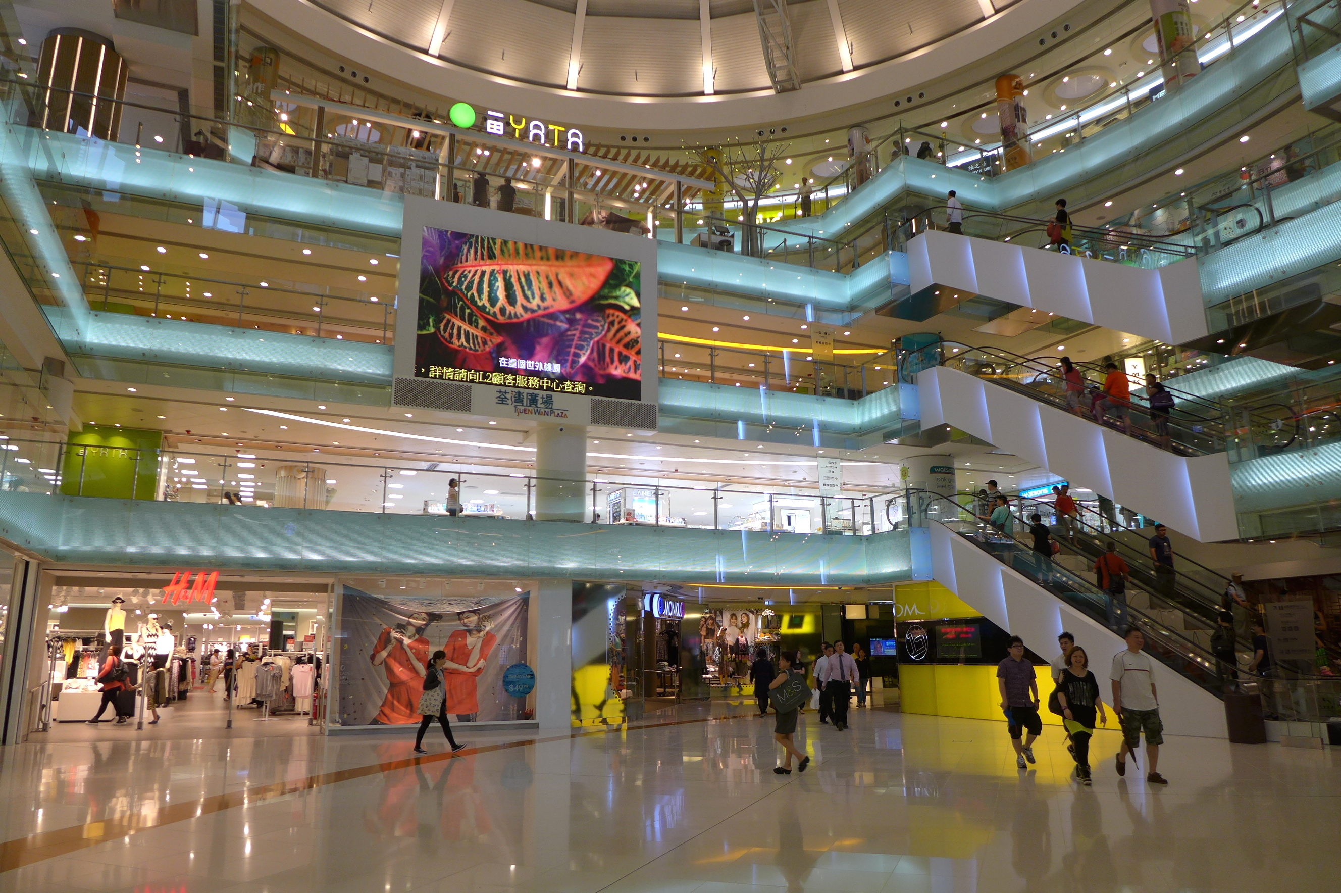 Tsuen Wan Plaza Main Void_